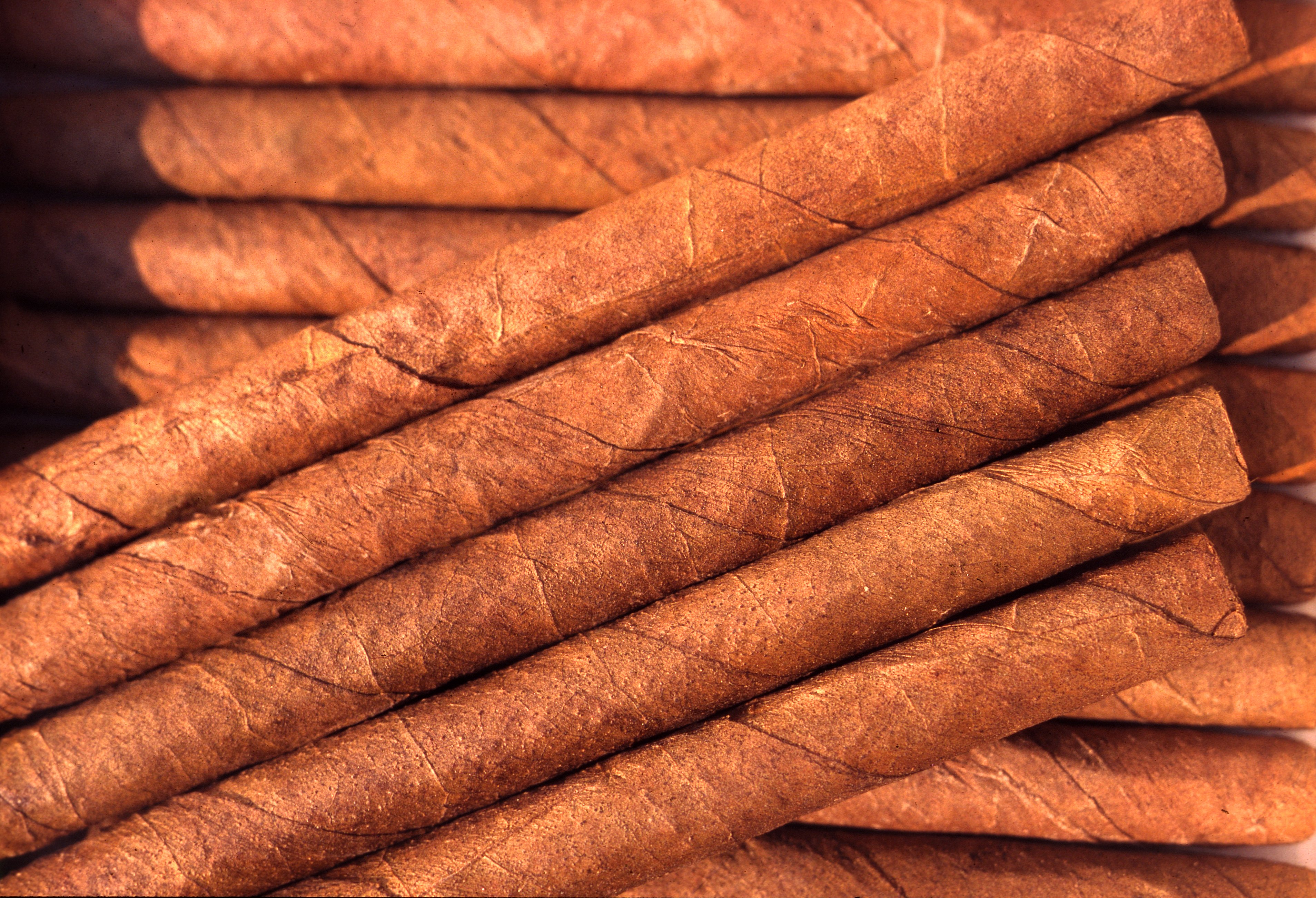 Zigarollos-Makro